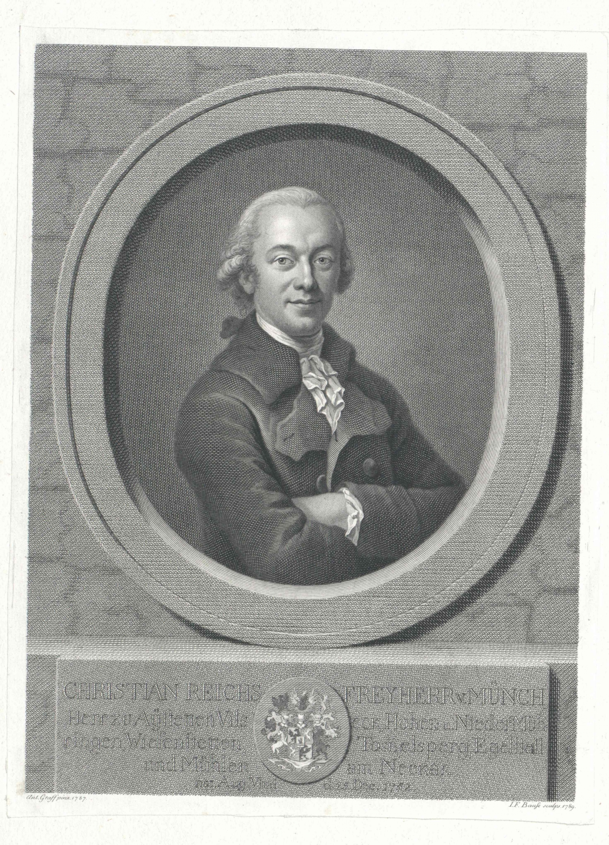 Christian Freiherr von Münch (1752-1821) zu Aystetten, Filseck, Hohenmühringen und Niedermühringen (Kupferstich)